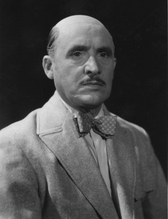 Juan José Porta- actor